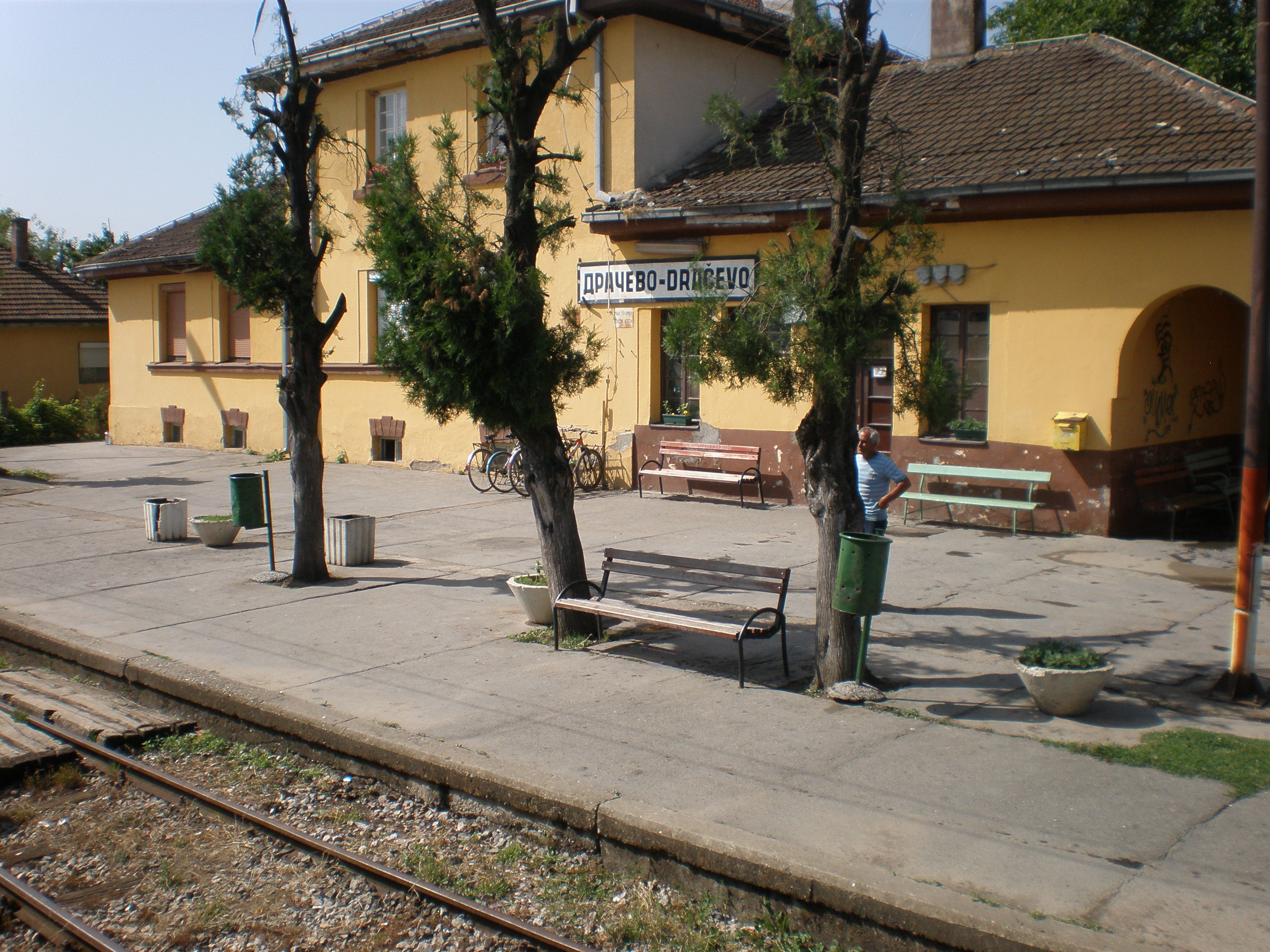 Поглед на железничката станица „Драчево“